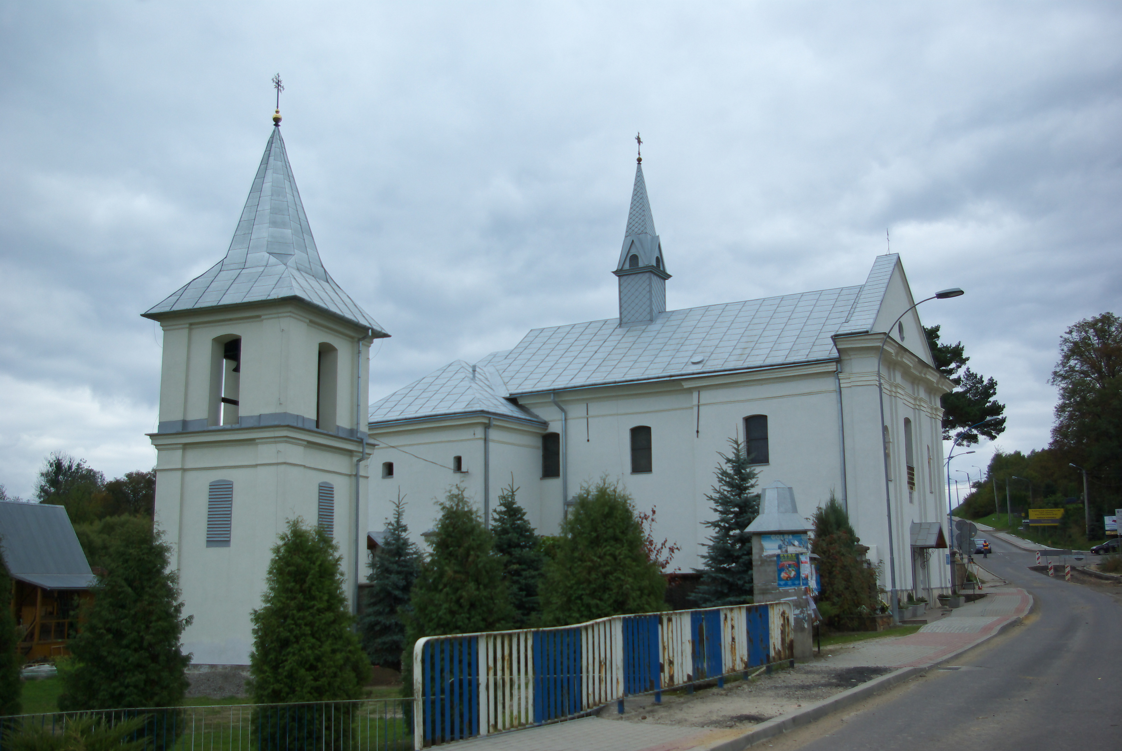 Kościół Wniebowzięcia Najświętszej Maryi Panny w Zagórzu.